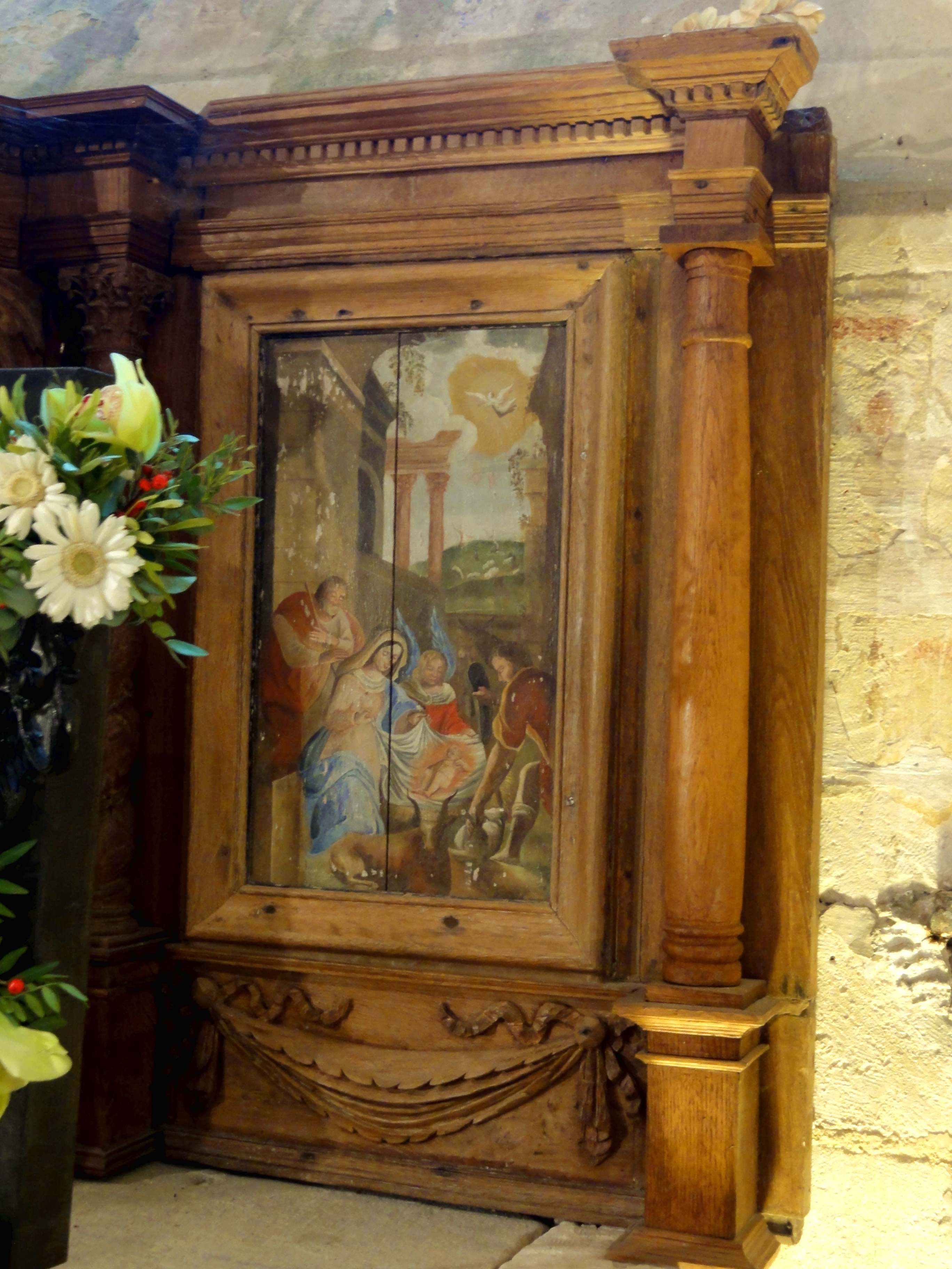 Tabernacle, aile droite - La Nativité du Christ.